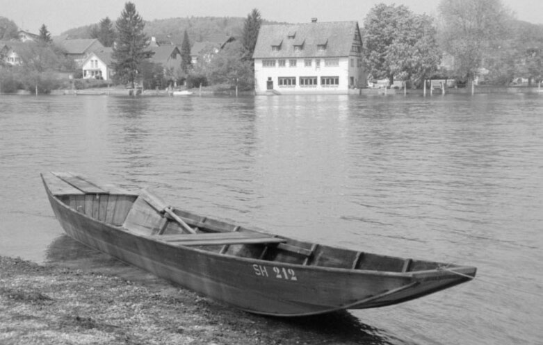 Typischer Weidling aus Holz fotografiert im Schaaren (TG) bei Schaffhausen, Schweiz. Im Hintergrund die Alte Rheinmühle von Büsingen.